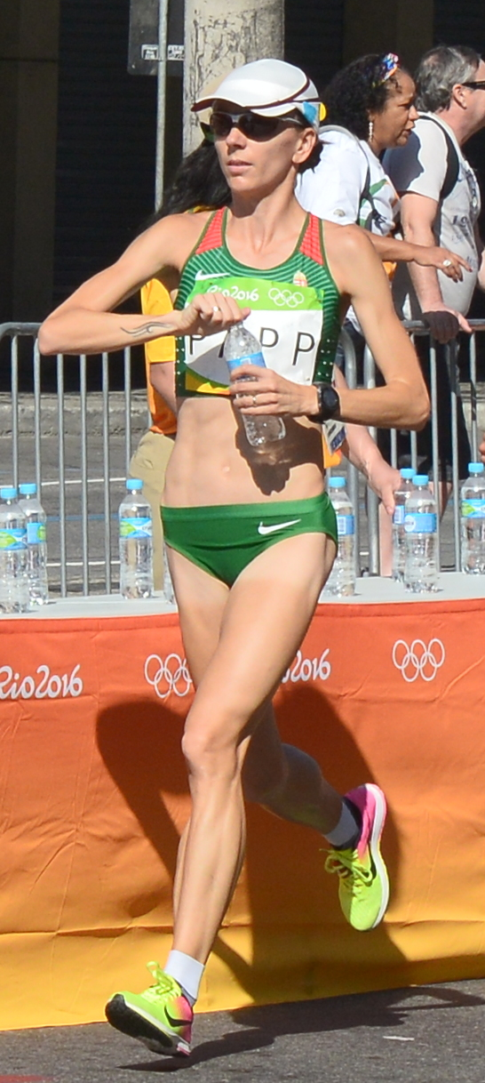 Passage du marathon des jeux olympiques de Rio 2016 dans le centre de Rio